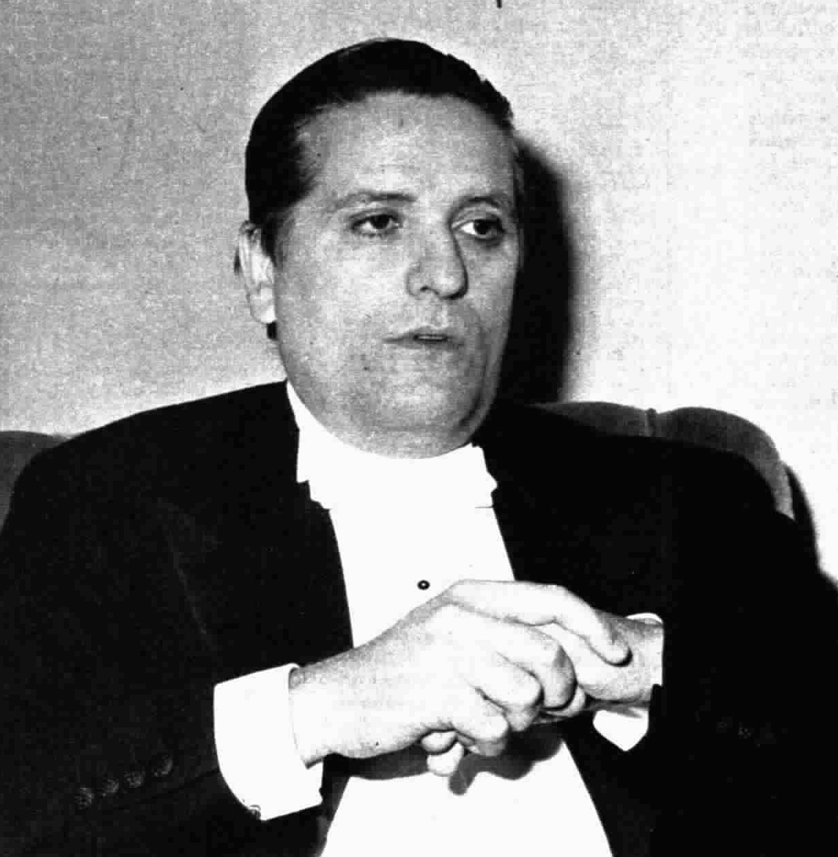 Italian composer, pianist, opera director Franco Mannino